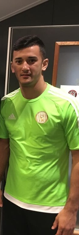 Sardor Rashidov, voetballer bij Al-Jazira.